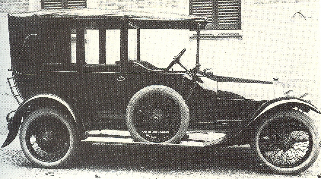 Fiat Tipo 5 (1916)